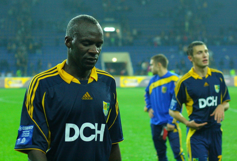 22/09/2010, 1/16 Кубка Украины, Металлист - Арсенал (Киев) - 1:2 Сани Кейта